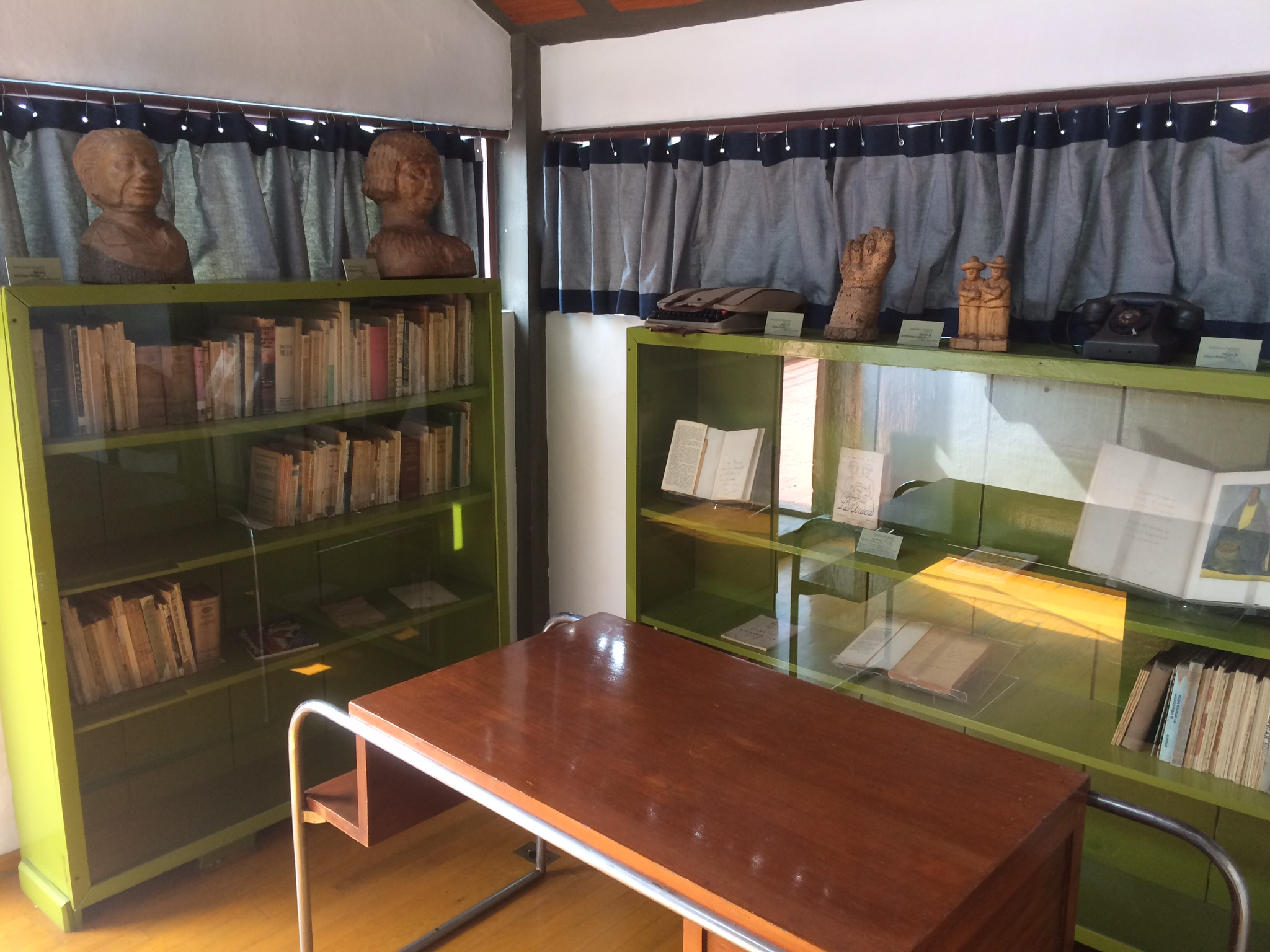 Esta habitación fue la oficina de Diego Rivera en el Museo Casa Estudio Diego Rivera y Frida Kahlo ubicado en San Ángel. Aquí se encuentra el escritorio y otros elementos de la época. La puerta exterior de este espacio lleva a una pequeña azotea.